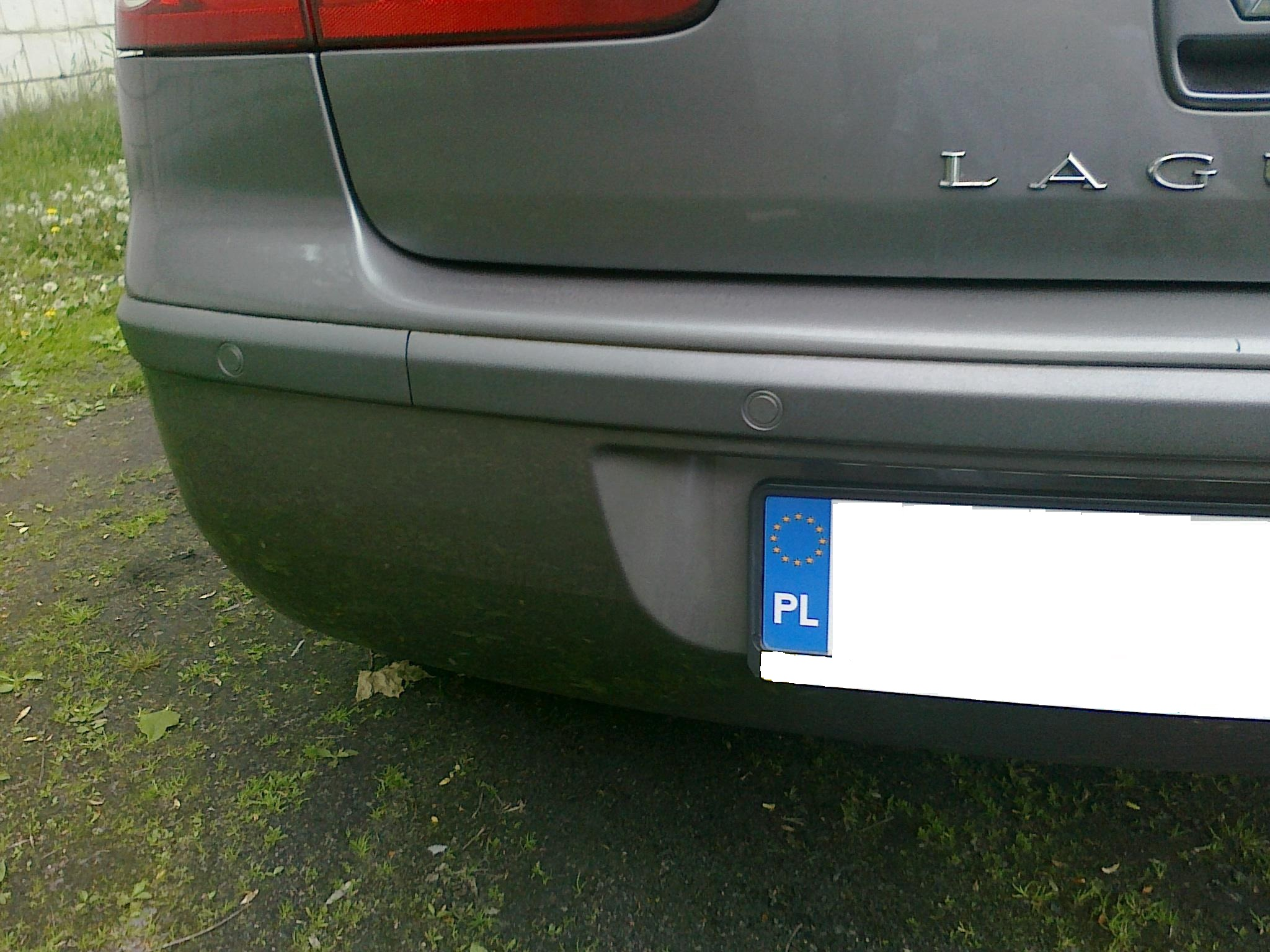 Poprawka zdjęcia